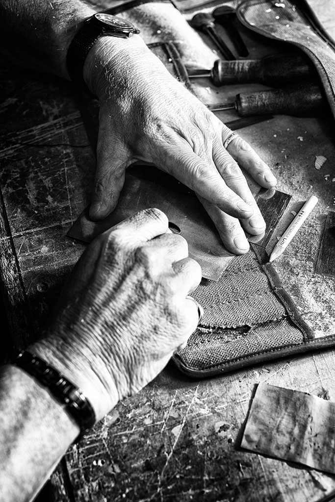 Geigenbauer